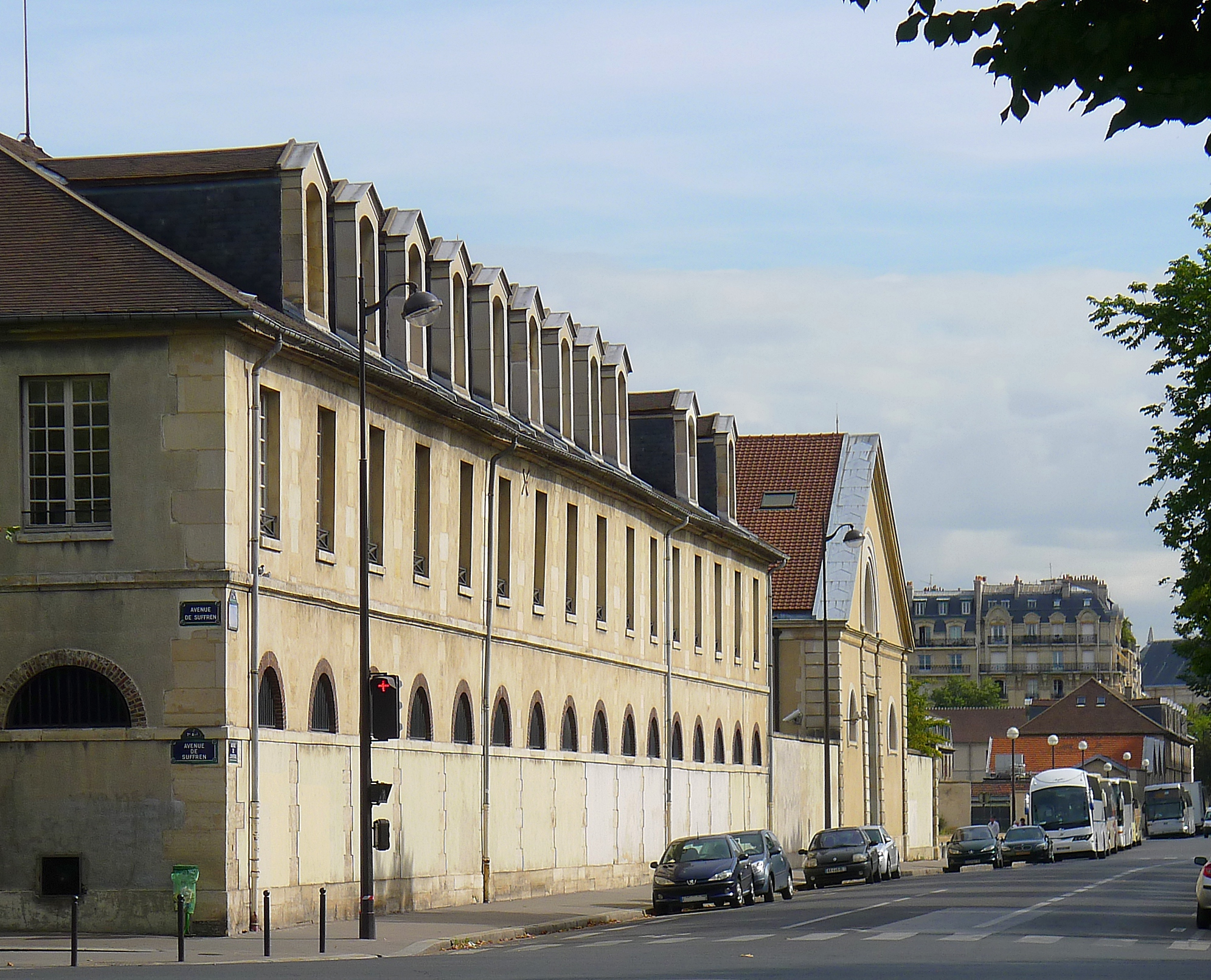 Avenue de Lowendal - Paris VII et XV